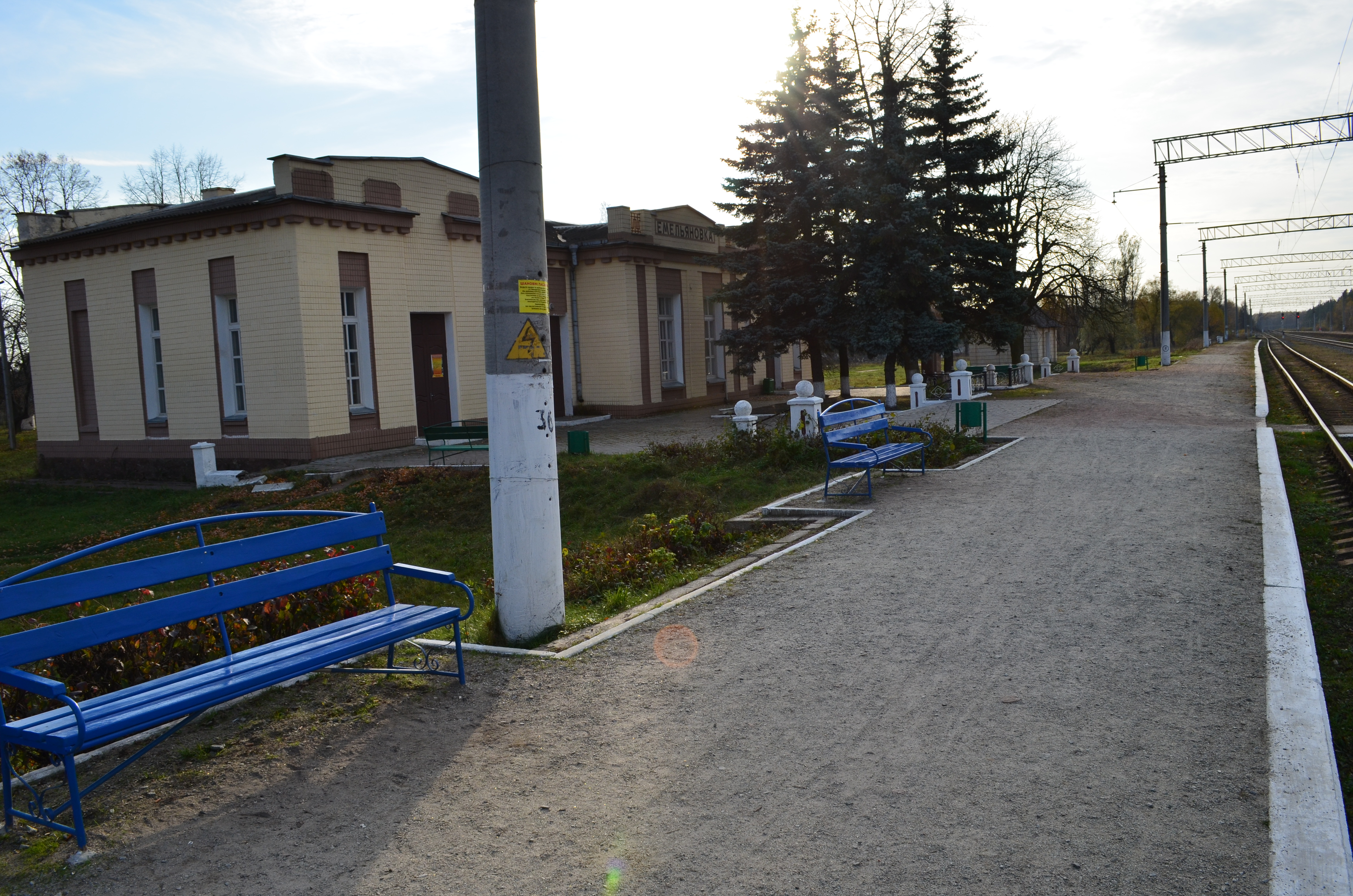 ст. Омельянівка